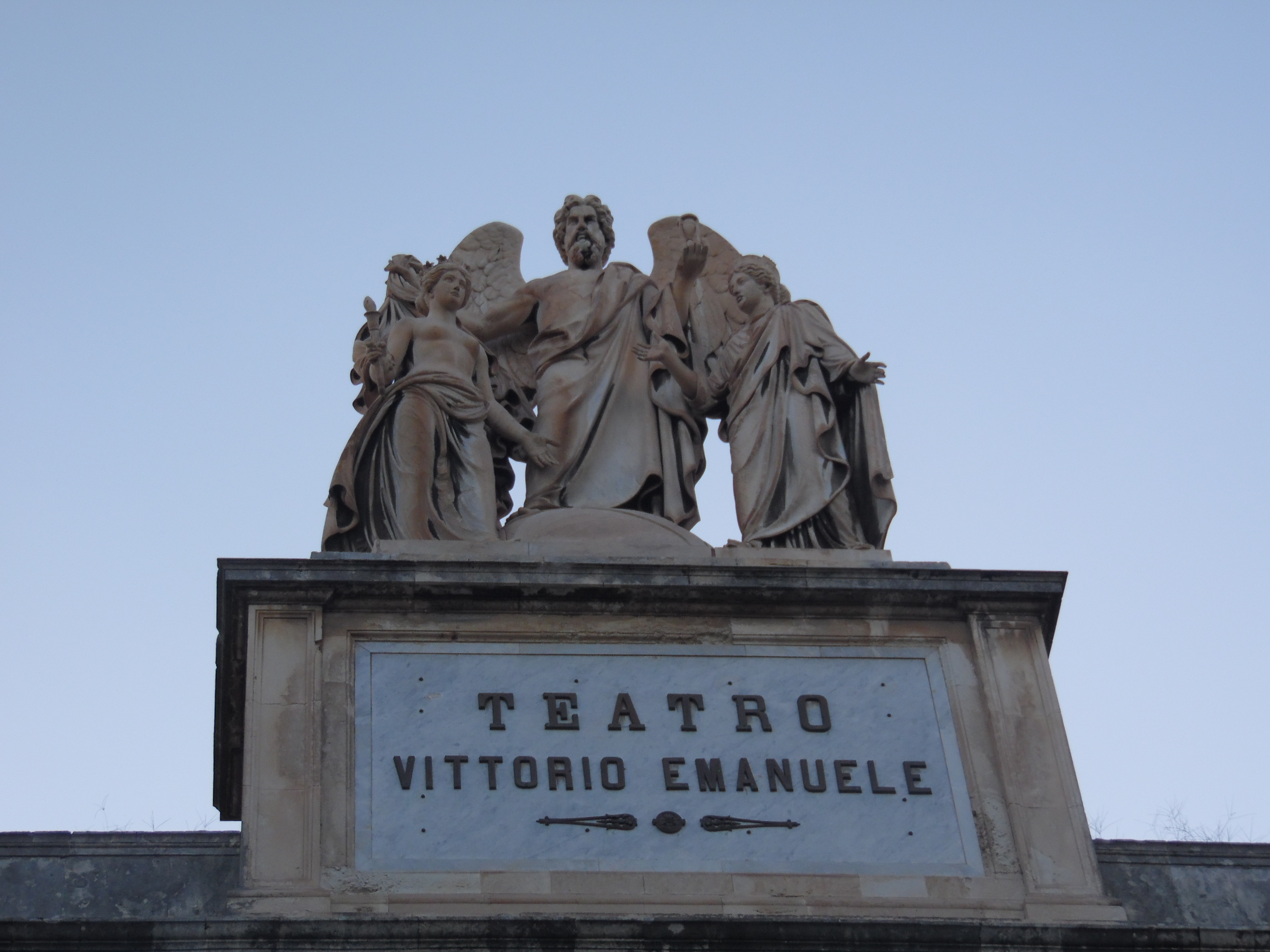 Teatro Vittorio Emanuele II This is a photo of a monument which is part of cultural heritage of Italy.